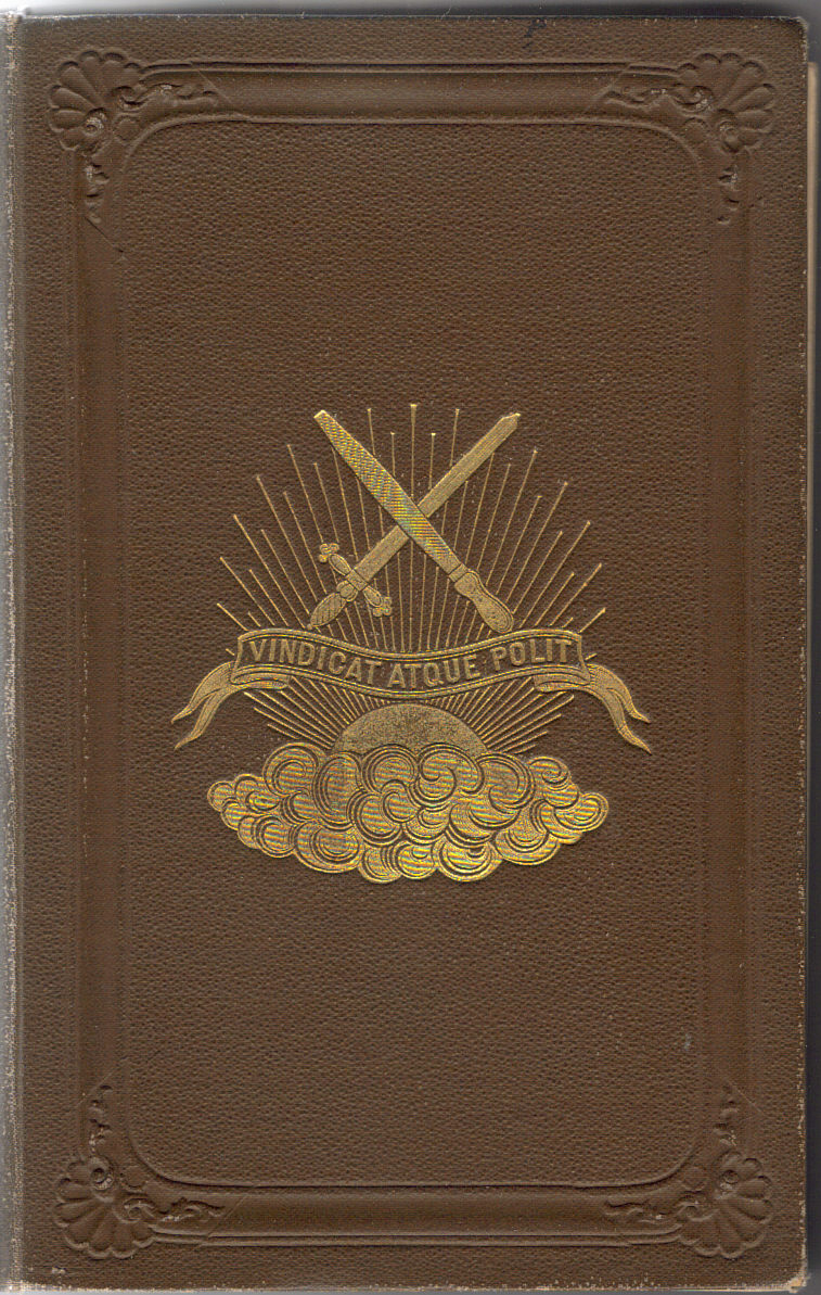 Band van Groningsche Studenten-Almanak voor het jaar 1892.